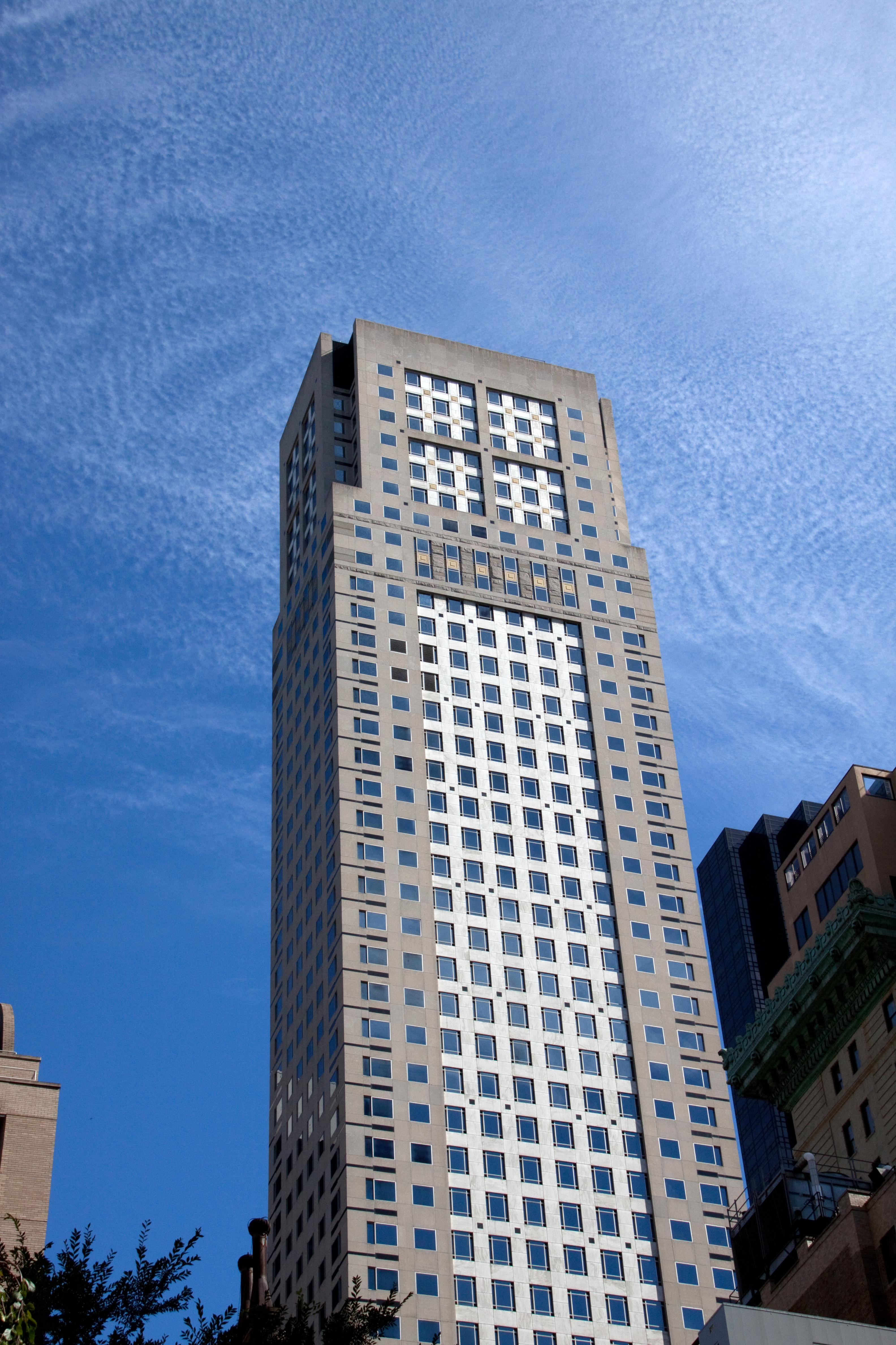 Skyscraper MOMA